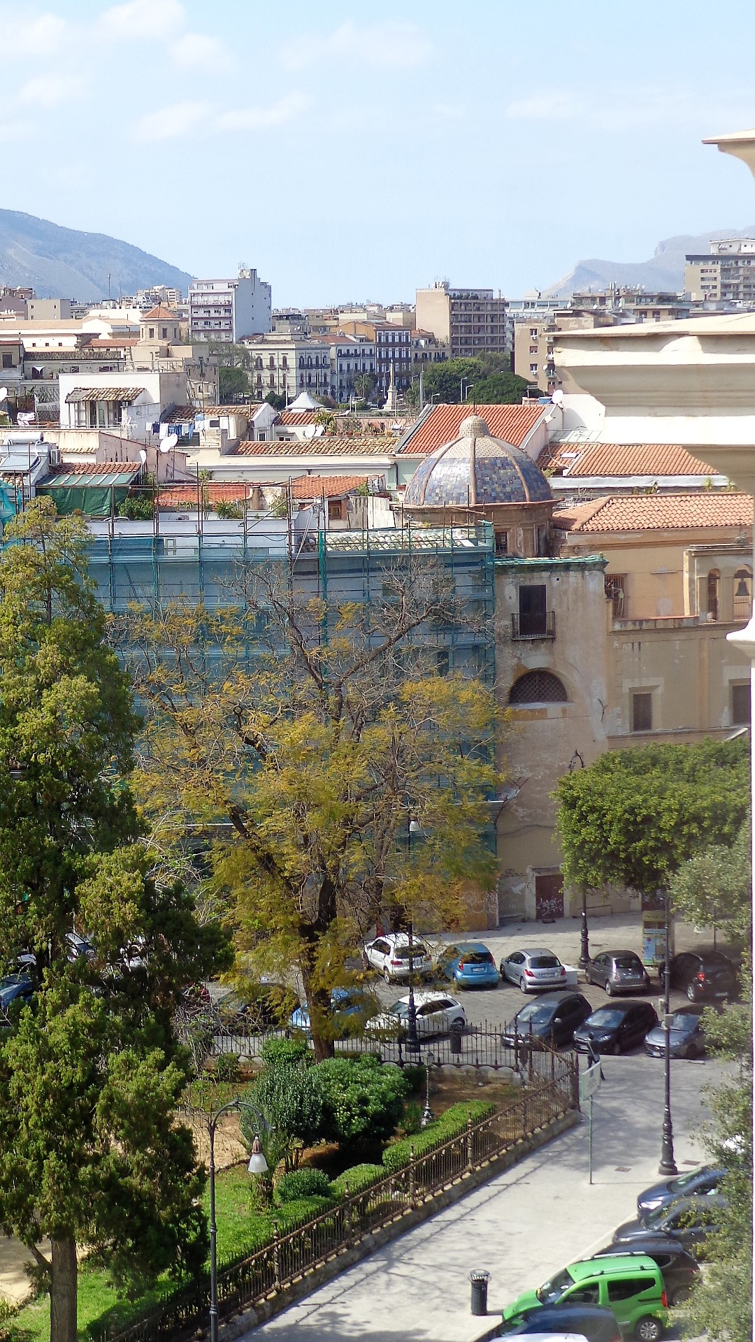 Terrazze e panorama. Chiesa di San Giovanni dei Napoletani.